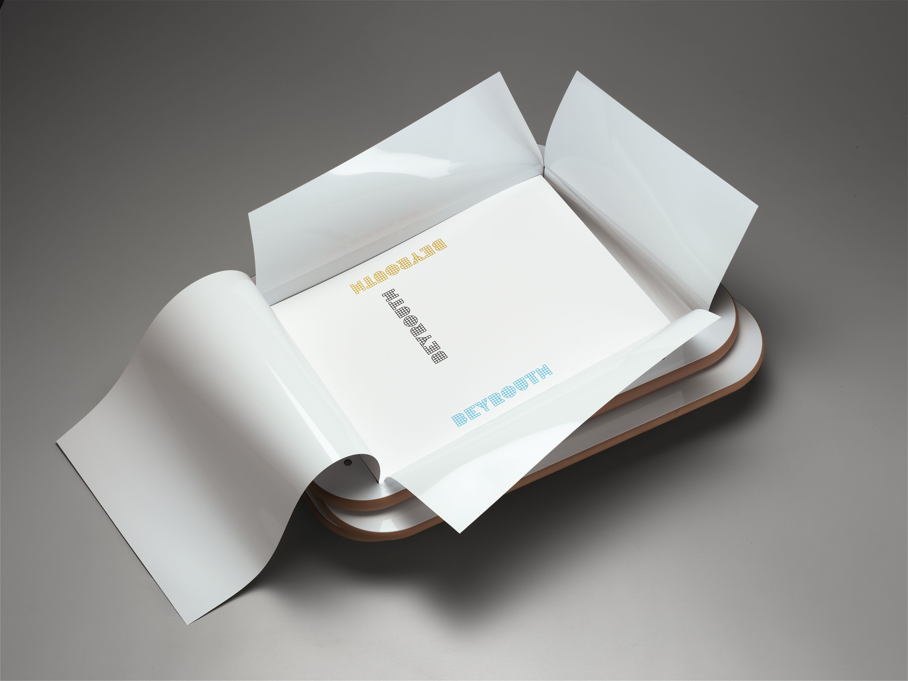 Livre d'artistes publié par les éditions Take5